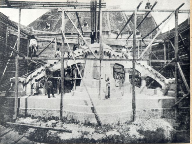 Construcția statuii lui Matei Corvin în Cluj-Napoca, 1902